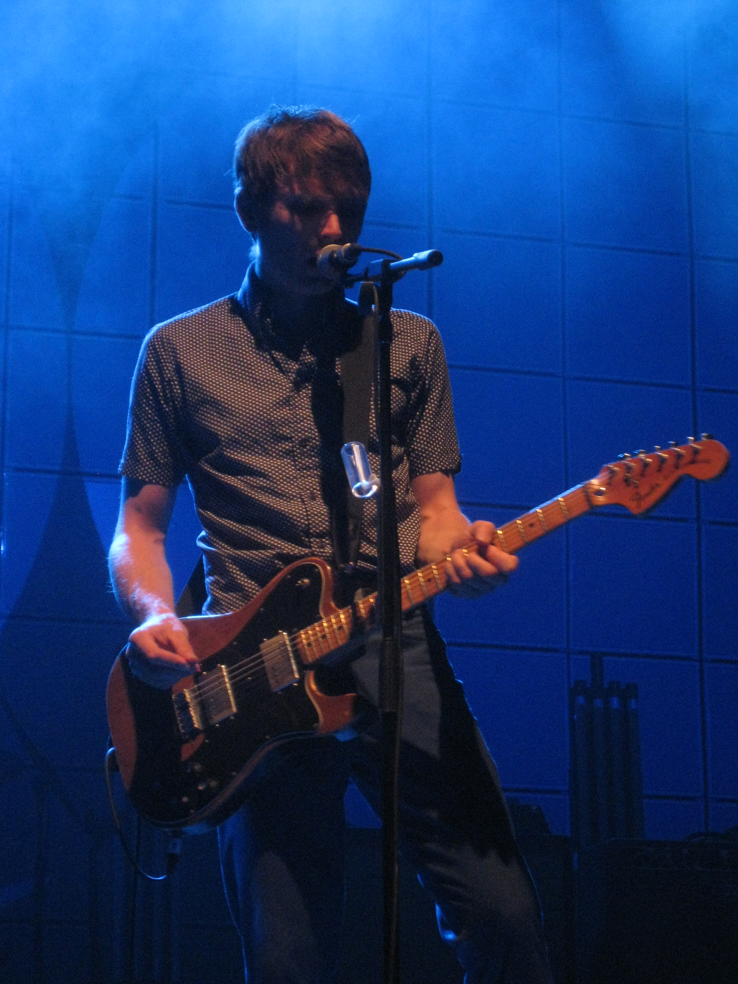 Franz Ferdinand @ Roseland Ballroom